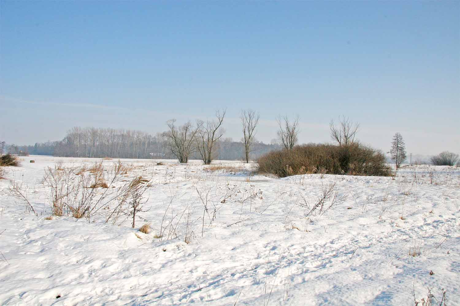 Pozůstatky tvrziště v Nechanicích, Nechanice, district Hradec Králové, Czech Republic autor: Prazak Date: 30. 1. 2006